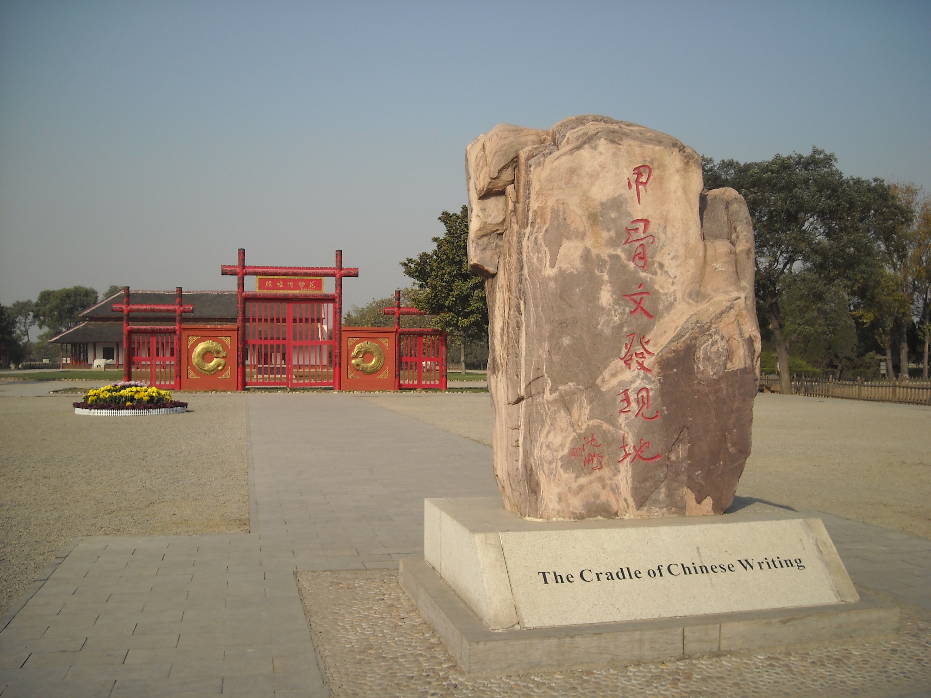 甲骨文发现地